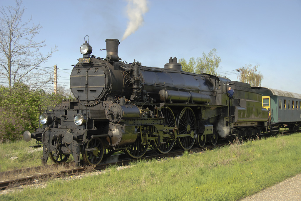 Heizhaus Strasshof, 310.23